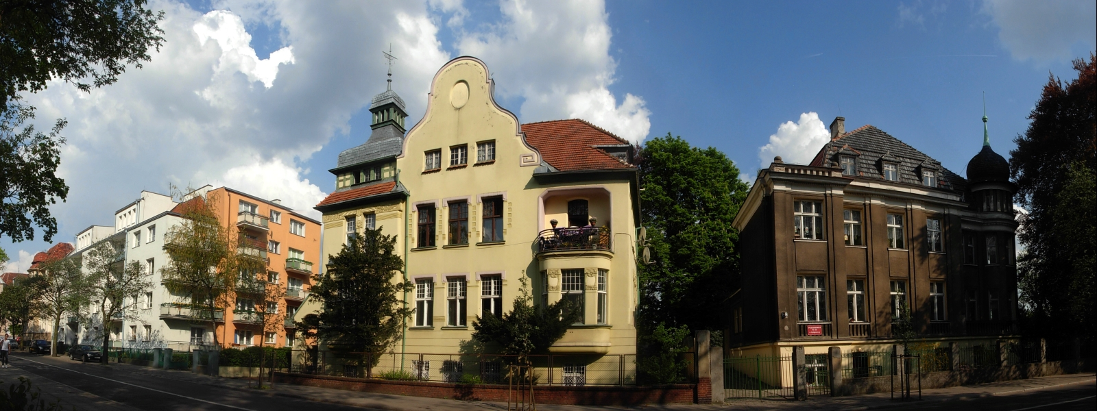 Ulica Ignacego Jana Paderewskiego w Bydgoszczy. Zabudowa z 1904-1912 r., secesja.